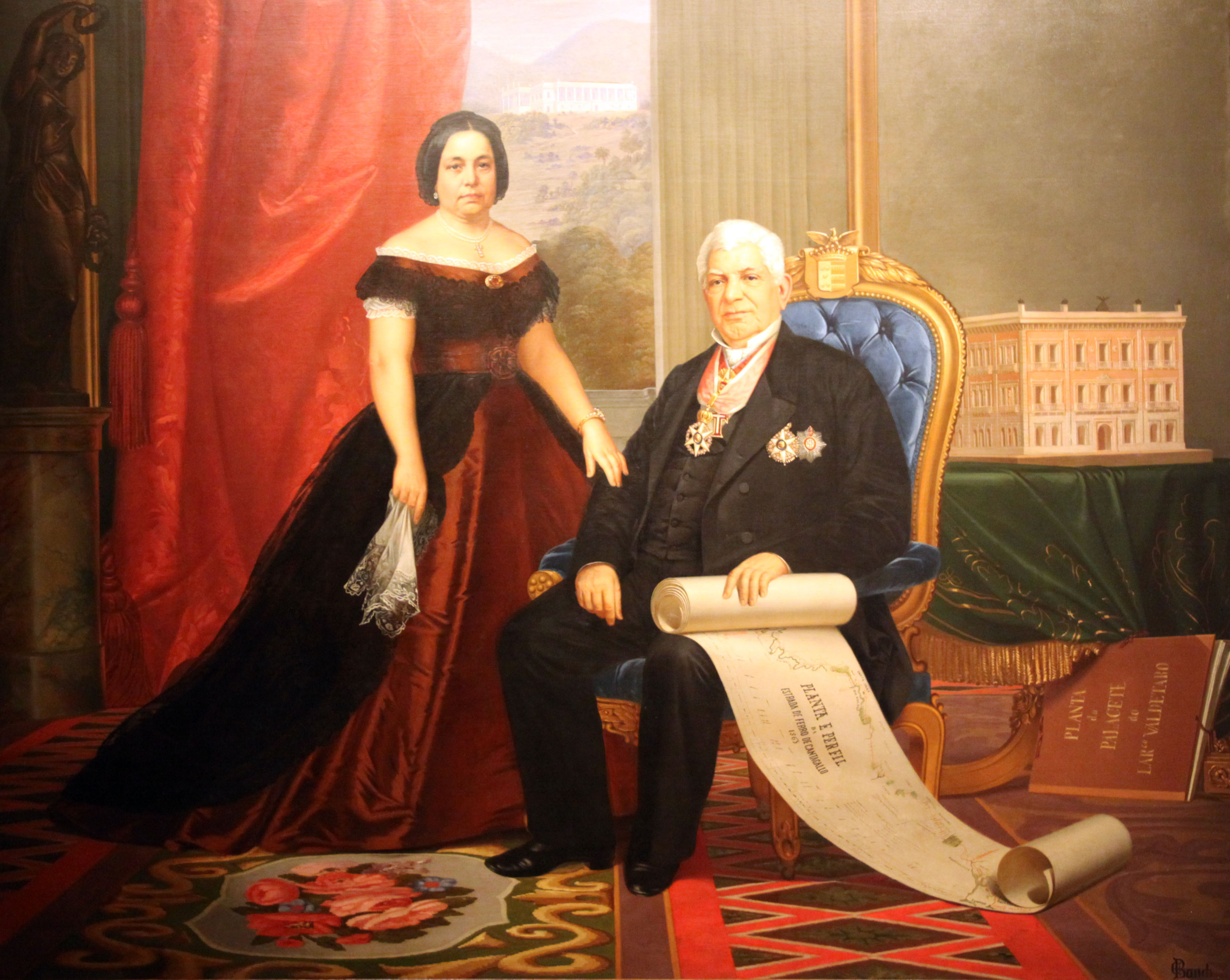 Óleo sobre tela, Emil Bauch, séc. XIX Acervo do IHGB/RJ (em comodato no Museu da República)